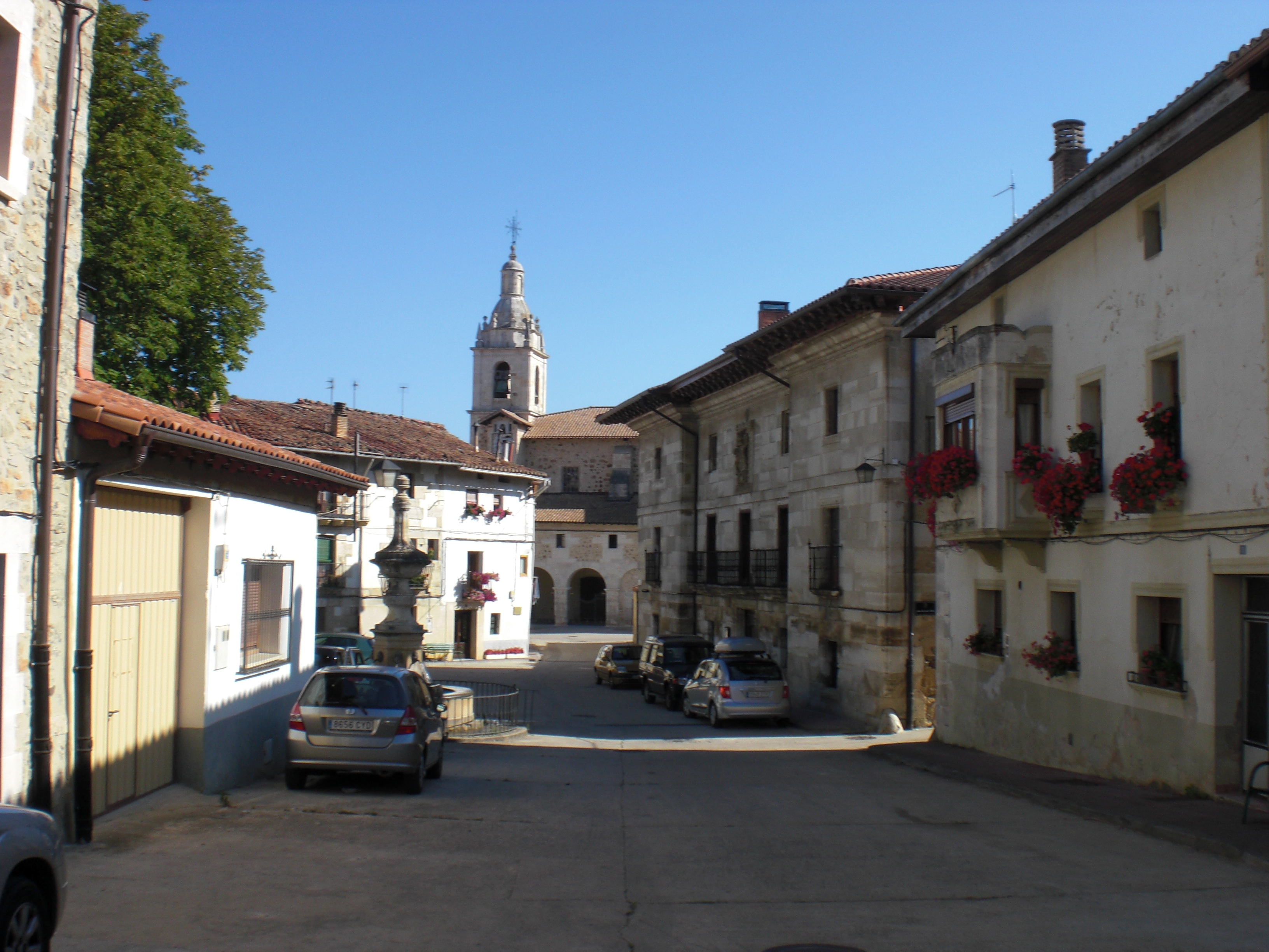 Maeztuko kale nagusiaren ikuspegia